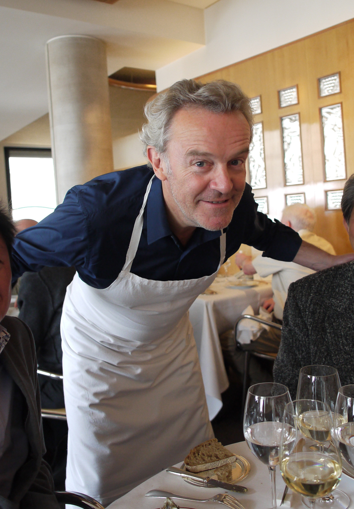 Alain Passard, chef de l'Arpège